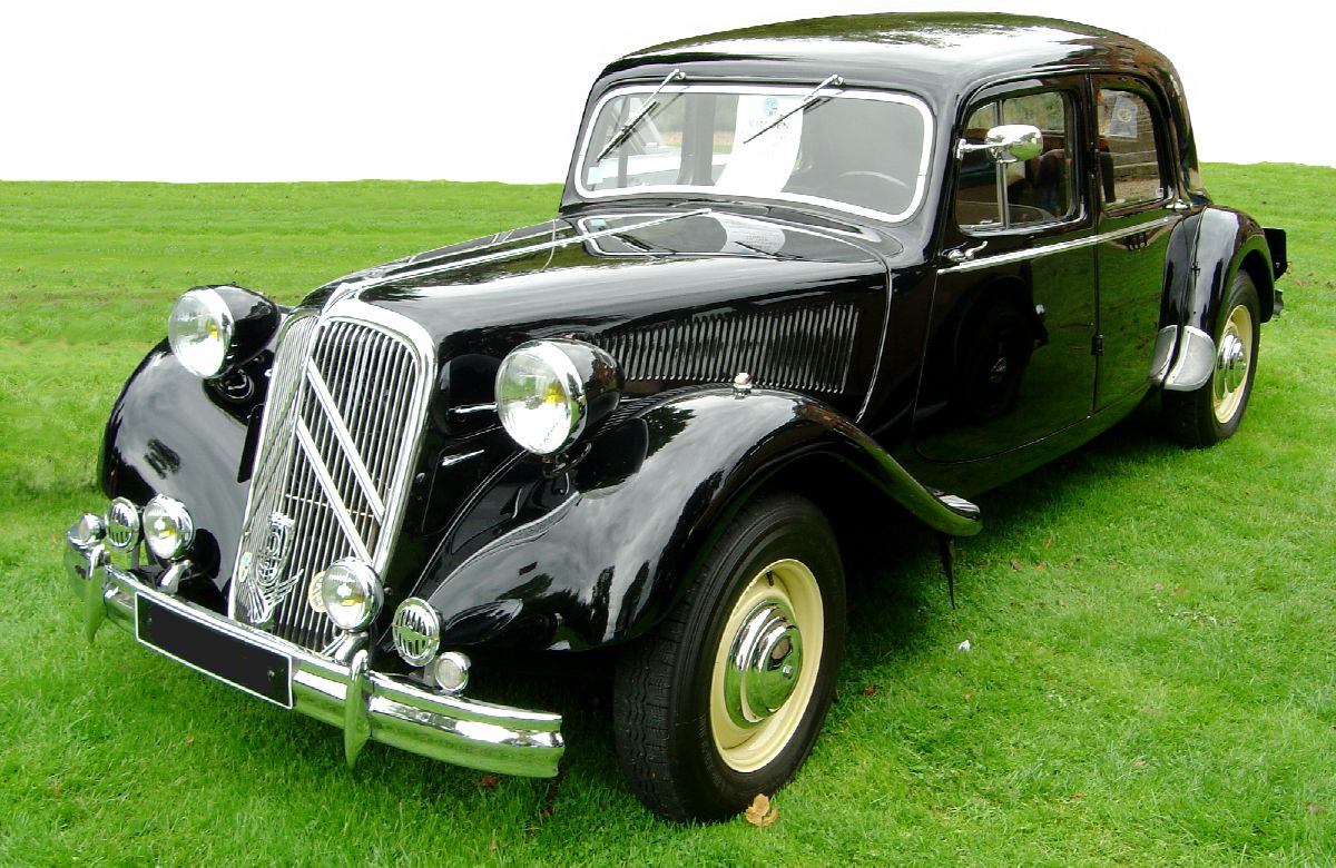 Une traction avant - à partir d'une photo personnelle prise en 2004